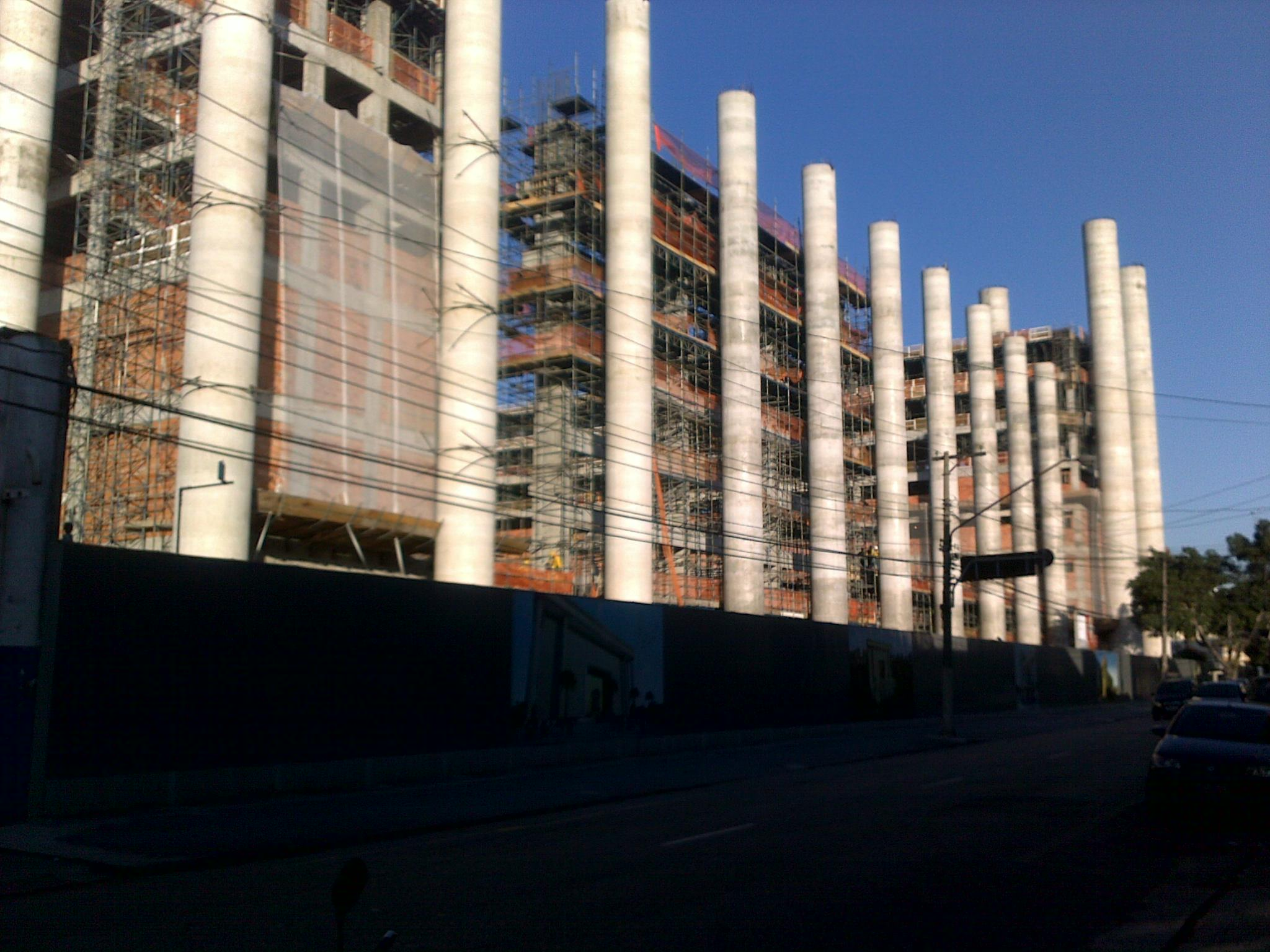 Construção do Templo de Salomão